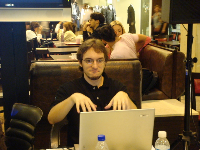 Rockman, redactor de la revista de videojuegos Loaded, finjiendo trabajar en su computadora portatil .